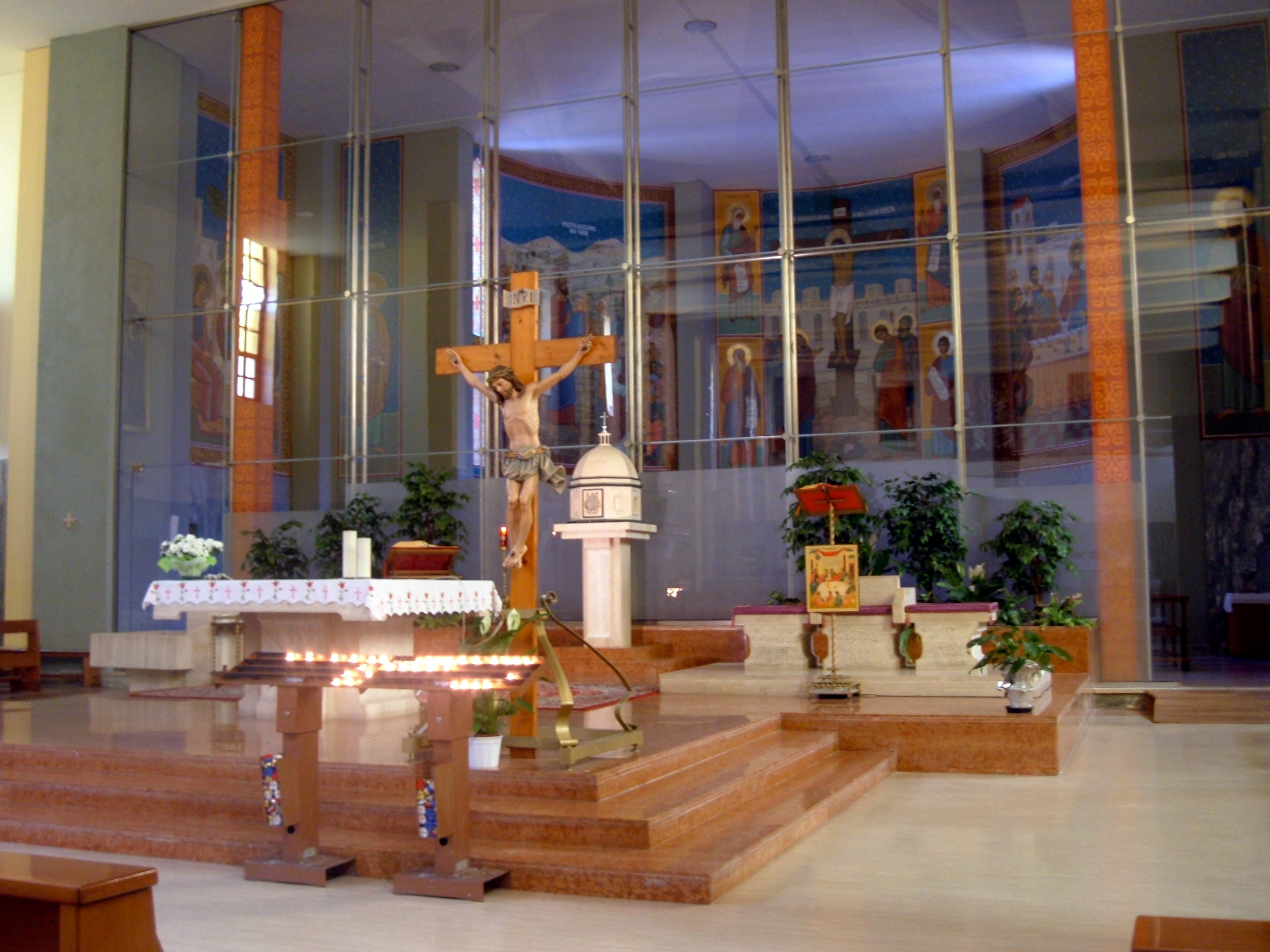 Chiesa del Santissimo Sacramento a Tor de' Schiavi, Roma, quartiere Prenestino-Labicano.